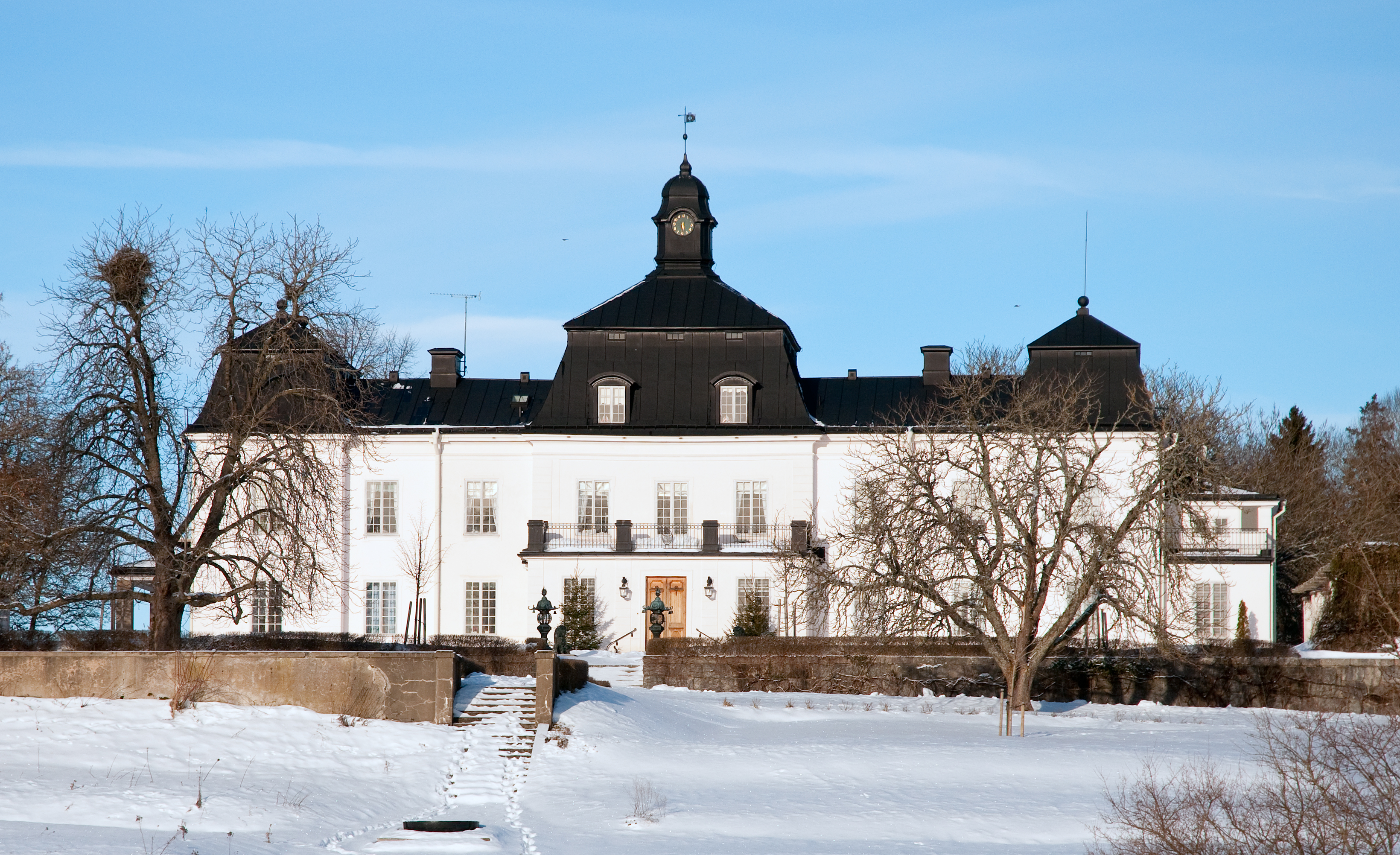 Ökna herrgård i Bogsta, Nyköpings kommun